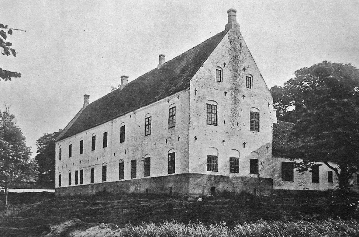 Kongstedlund set fra sydvest. Kongstedlund ligger i Sønder Kongerslev Sogn, Hellum Herred, Ålborg Amt, Sejlflod Kommune. Hovedbygningen er opført i 1592 og ombygget i 1640